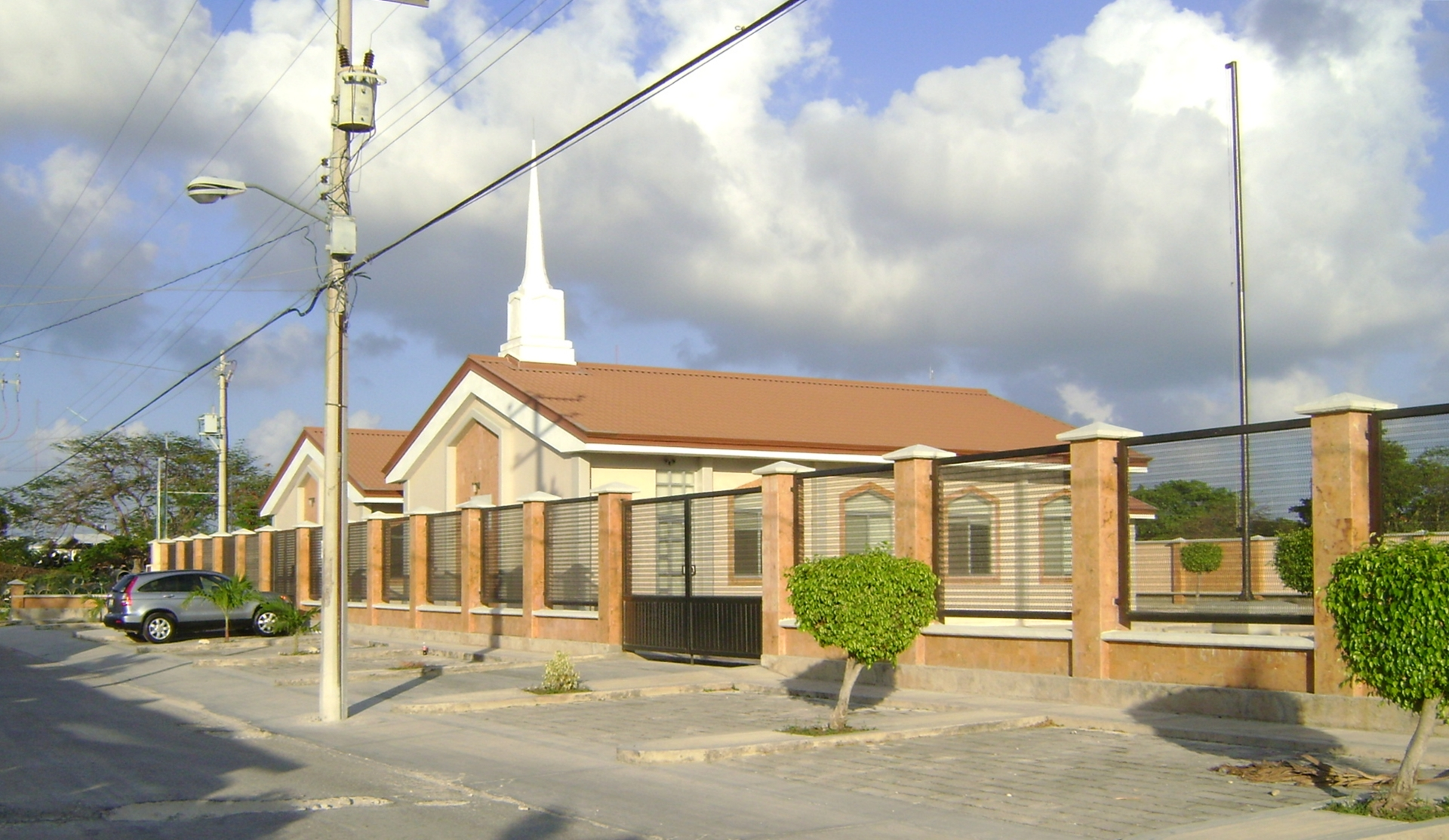 La Iglesia de Jesucristo de los Santos de los Últimos Días Kabah Res. San Antonio Reg. 93 Mza. 58 Lte. 1 Calle 6 entre calle Futura y calle 37-A Cancún